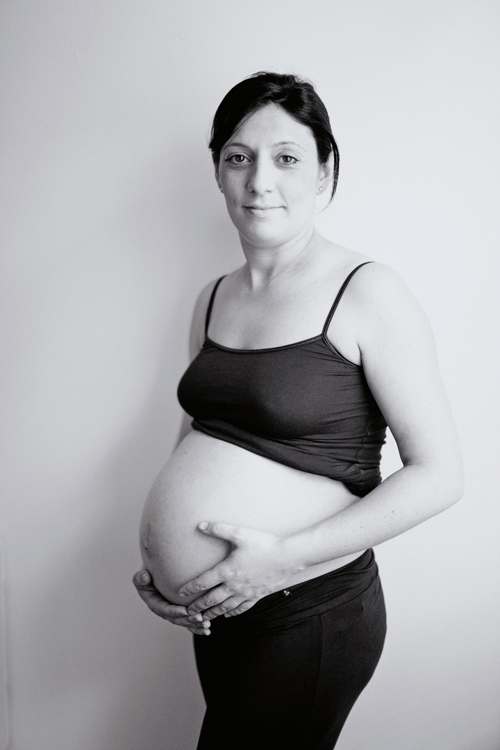 Olga-6a